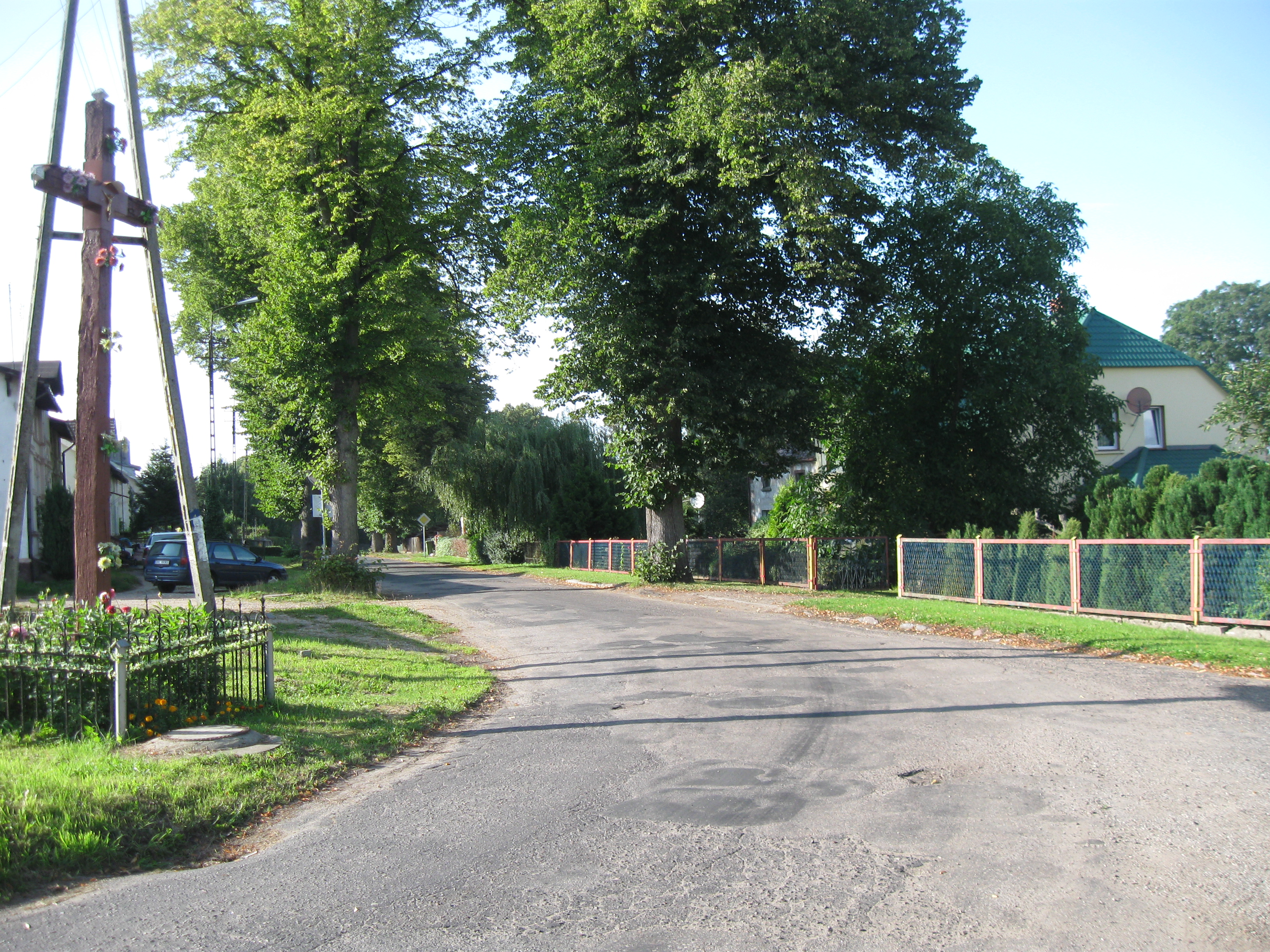 Centrum Niemierza